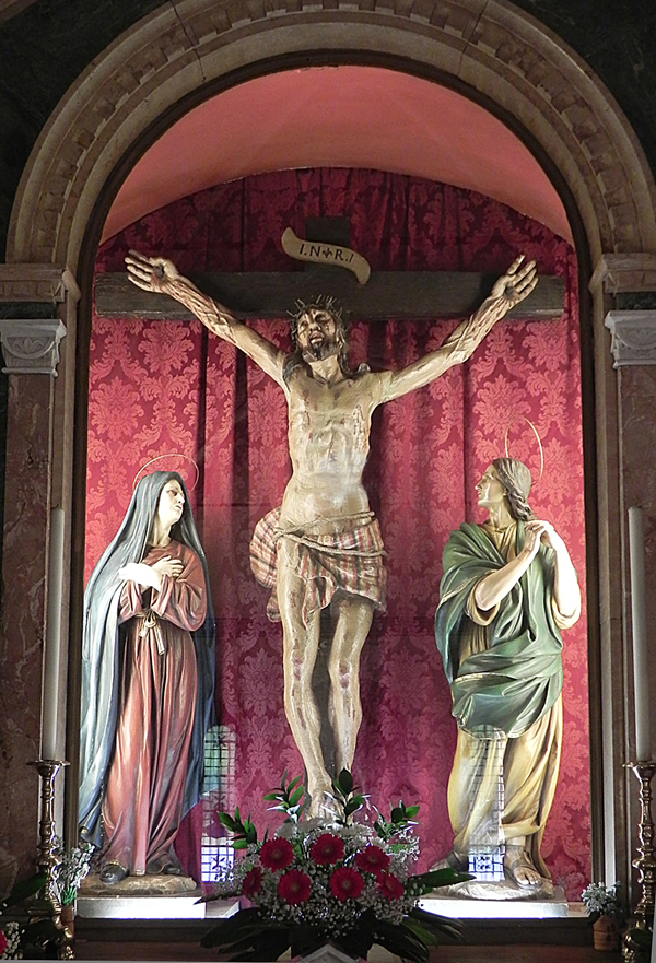 L'effige del SS Crocefisso nell'omonimo santuario a Gorno (BG)